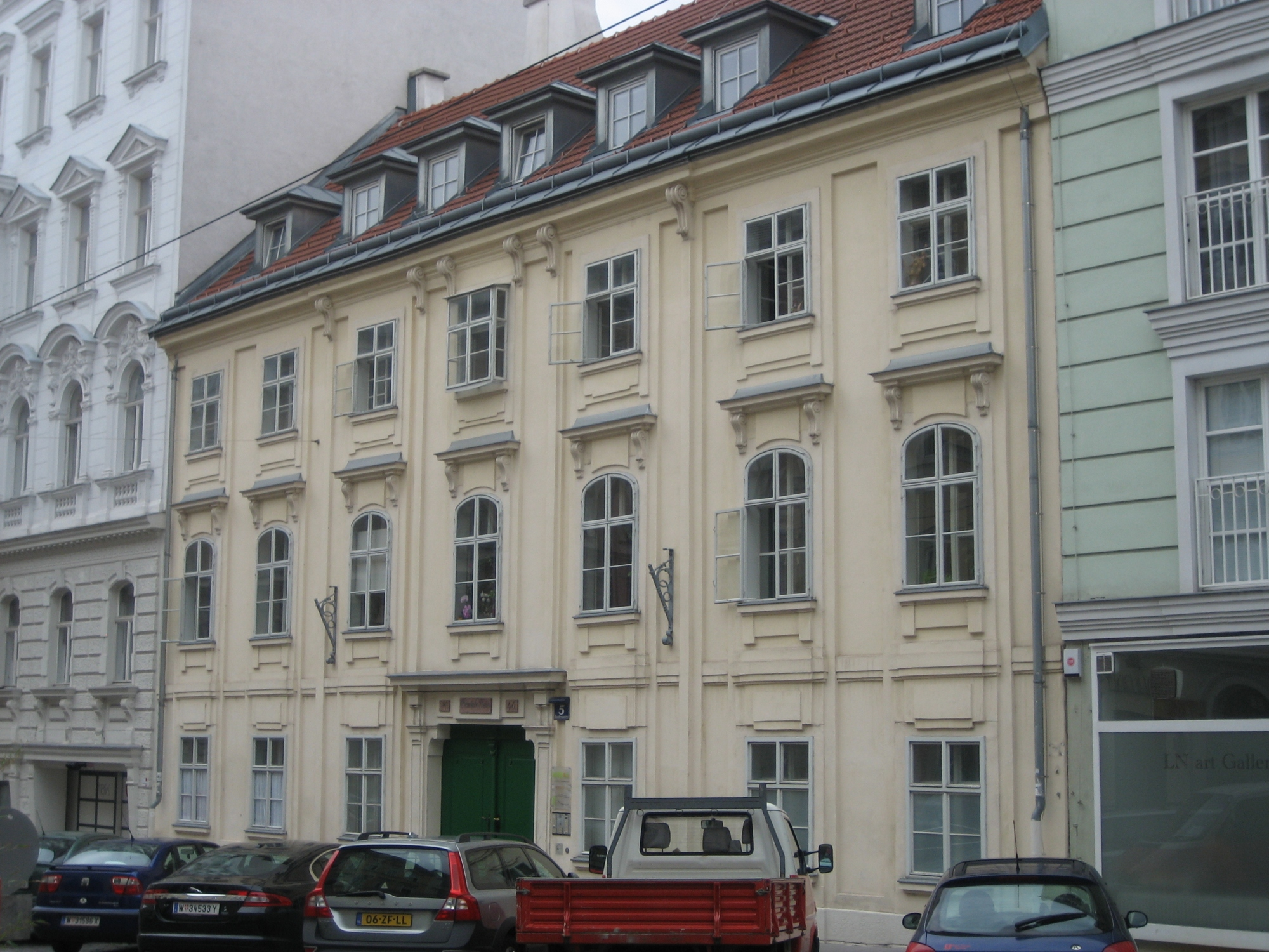 das Haus Laudongasse 5 in der Josefstadt, in Wien